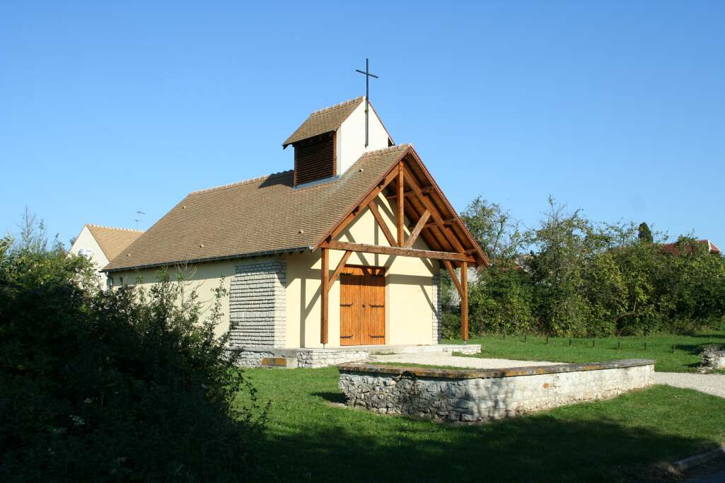 Église de Mulcent - Yvelines (France)